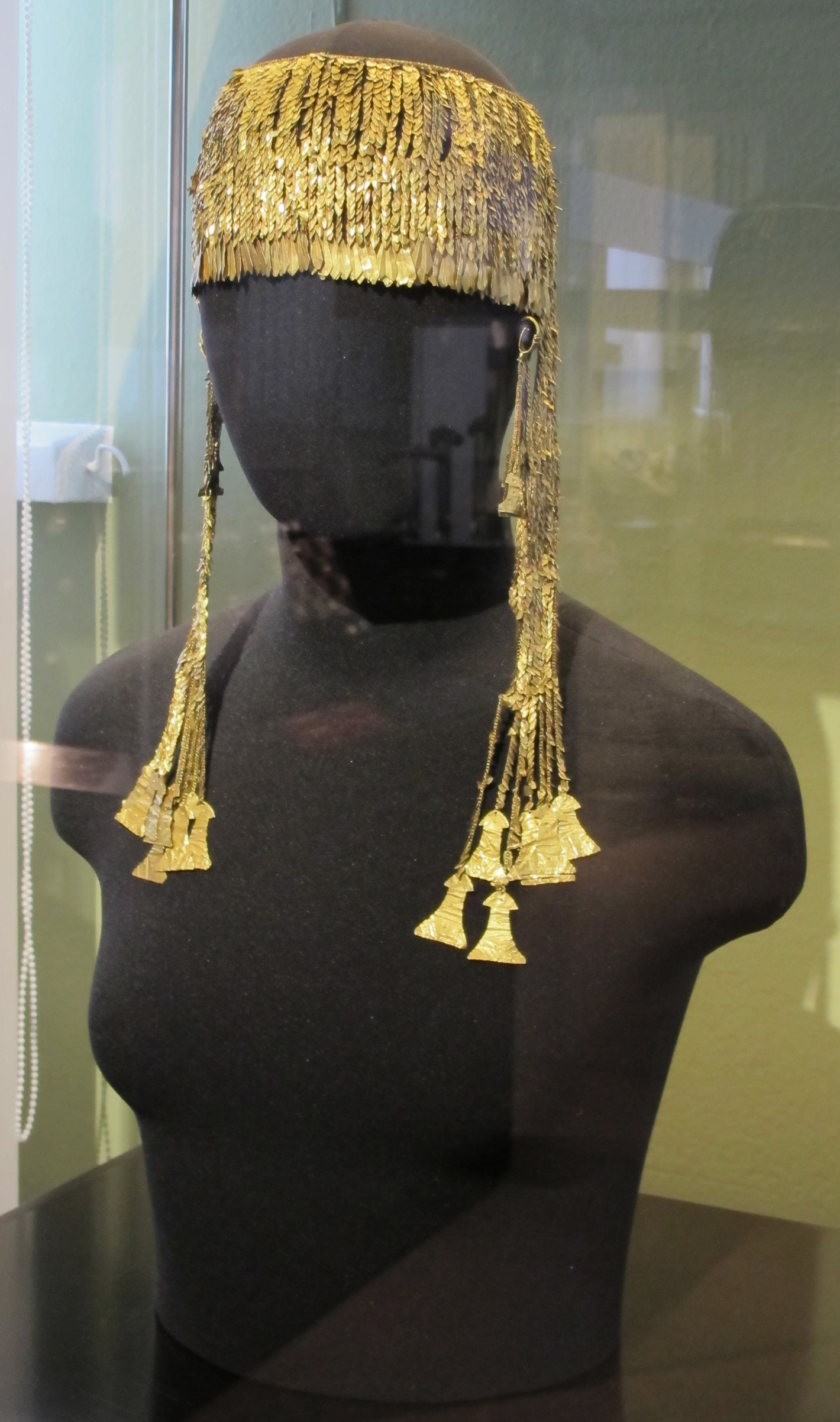 Tesoro di priamo, grande diadema con pendenti, oro, cat. 10